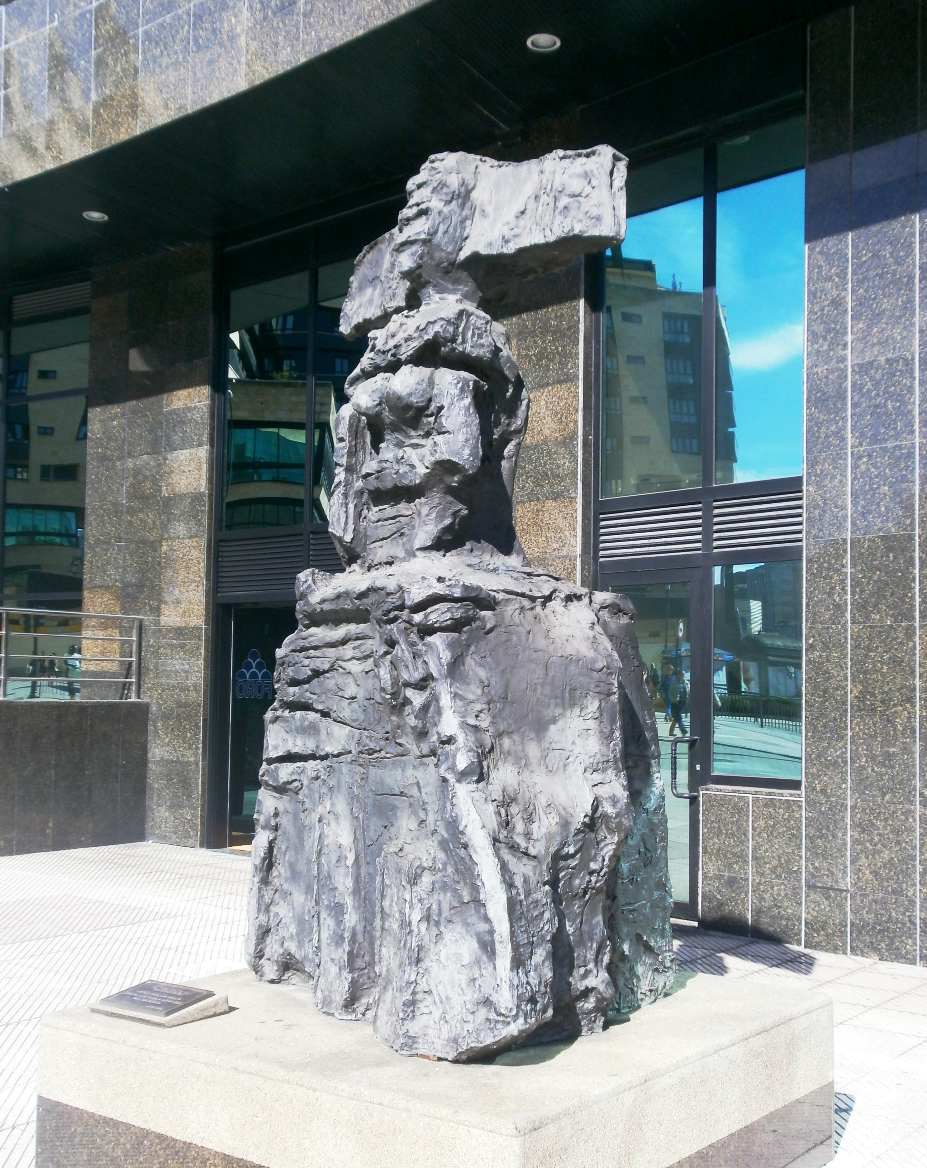 Esculturas en Oviedo al aire libre